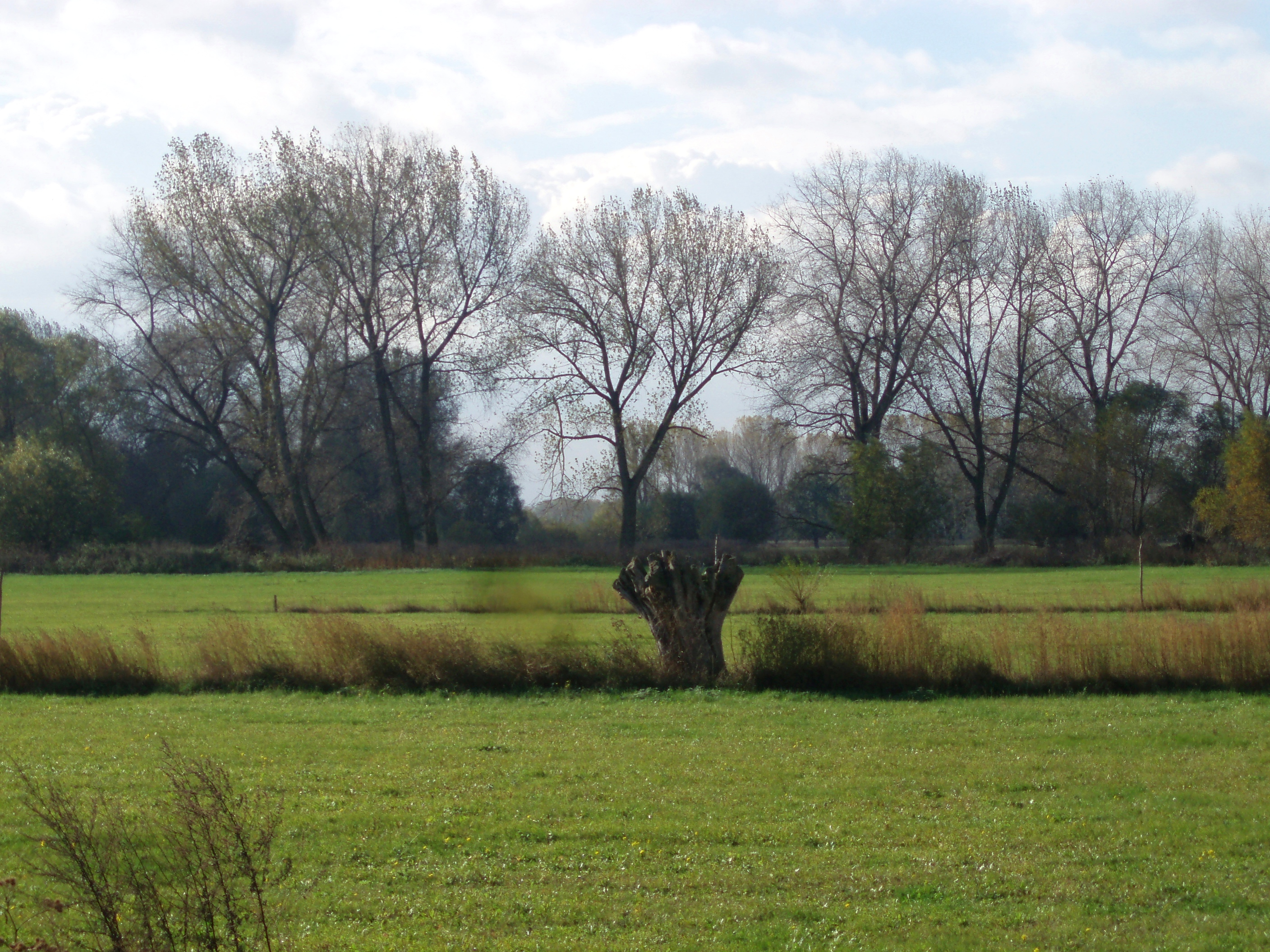 Landschaft Gemeinde Elsteraue in Sachsen-Anhalt